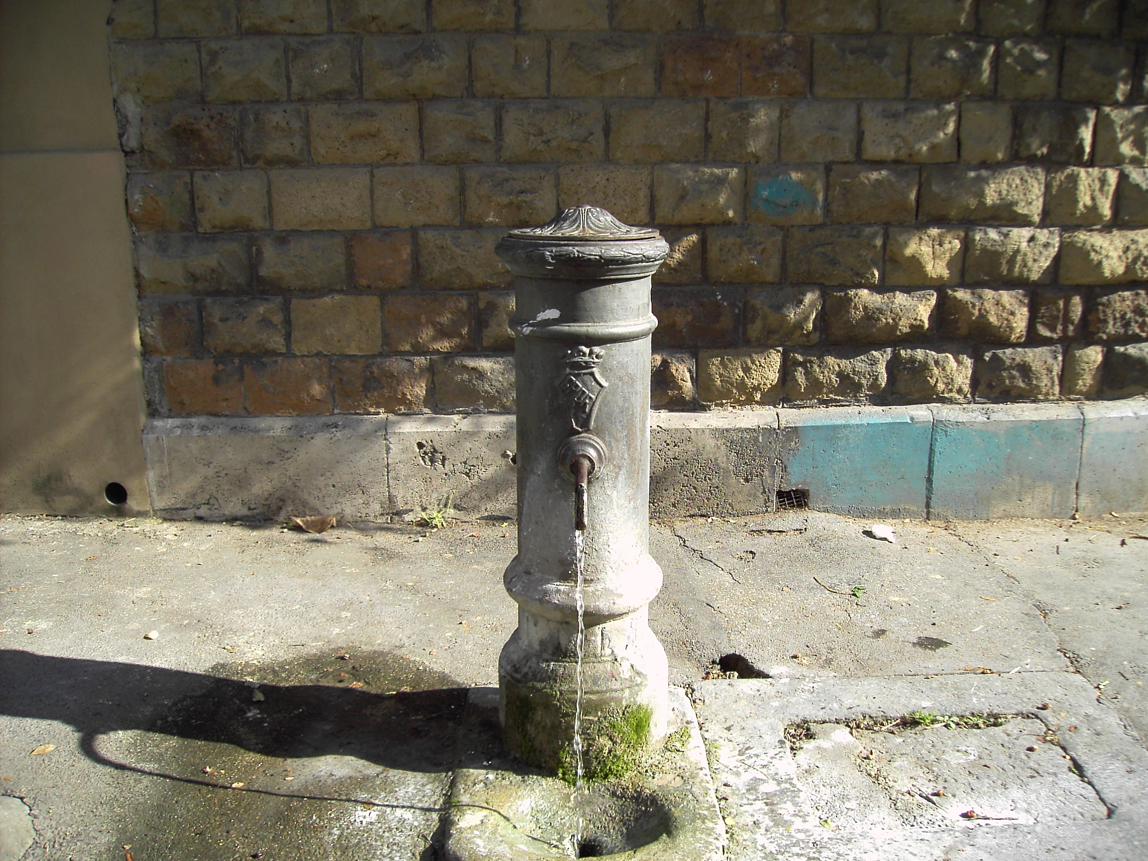 Roma, nasone anni 1930 a via Annia Faustina